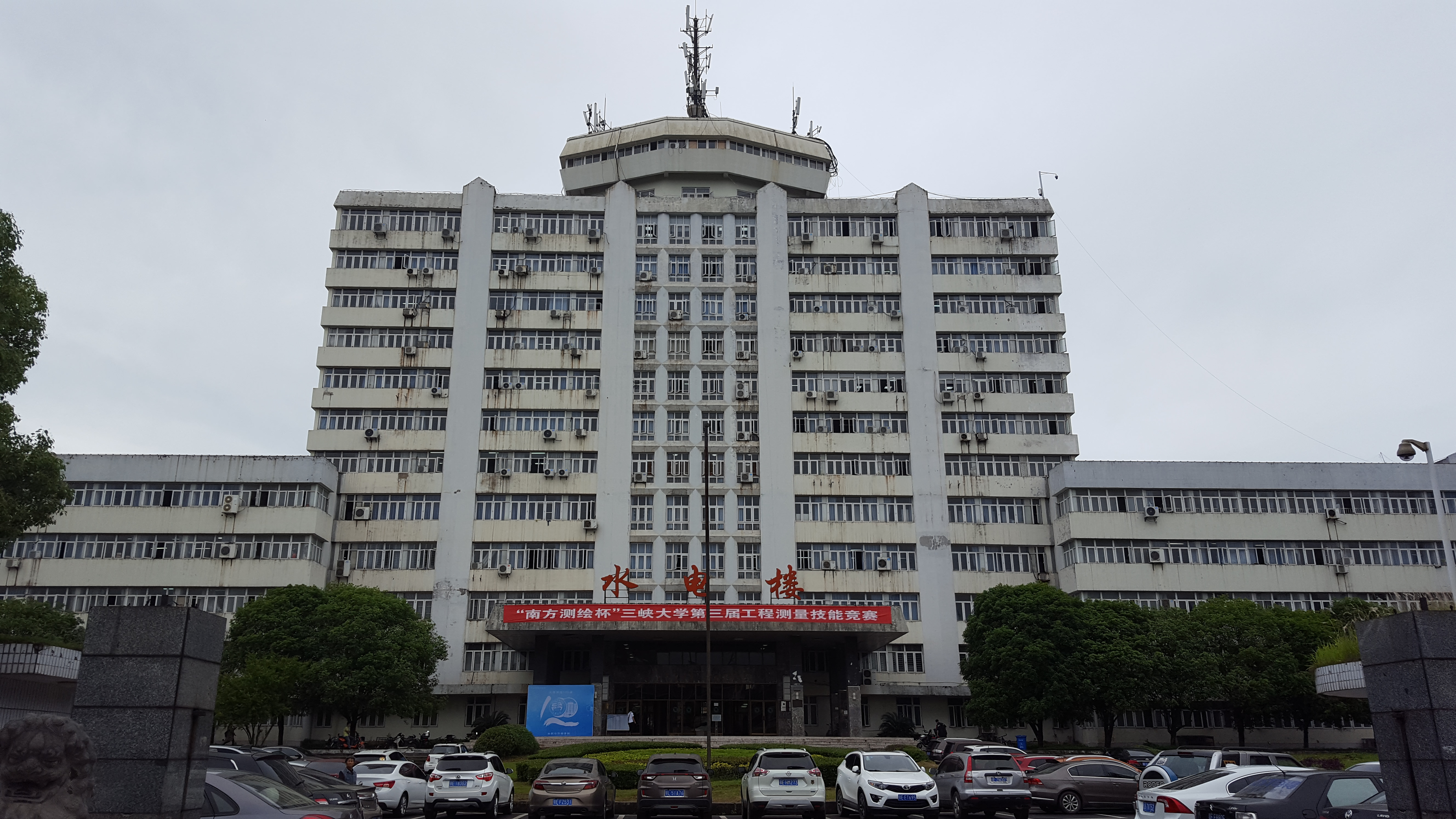 三峡大学水电楼，位于中国湖北省宜昌市三峡大学西苑。该楼为三峡大学标志性建筑，共14层，采用框架式结构，绝对标高77.90米，建筑面积18348㎡，工程造价670万元。长沙市建筑工程公司宜昌工程处于1987年10月7日开工建造，1990年8月25日竣工。竣工验评中分部工程共验评8项，优良5项，优良率62.5％，其中优良部分为：地基与基础、主体、装饰、屋面，合格部分为：地面与楼面、门窗、暖卫、电气。感官质量评定得分率86％。